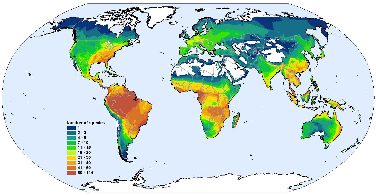 Diversidad global de las especies de anfibios. Note: For some regions obviously the diversity is not shown properly. For example, Southern Europe has a higher number of amphibian species than Central Europe (Italy: 48, France: 40, Spain: 33, ...)!